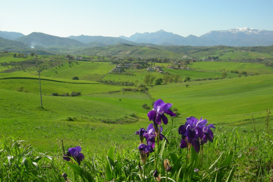 La campagna di San Marco Argentano